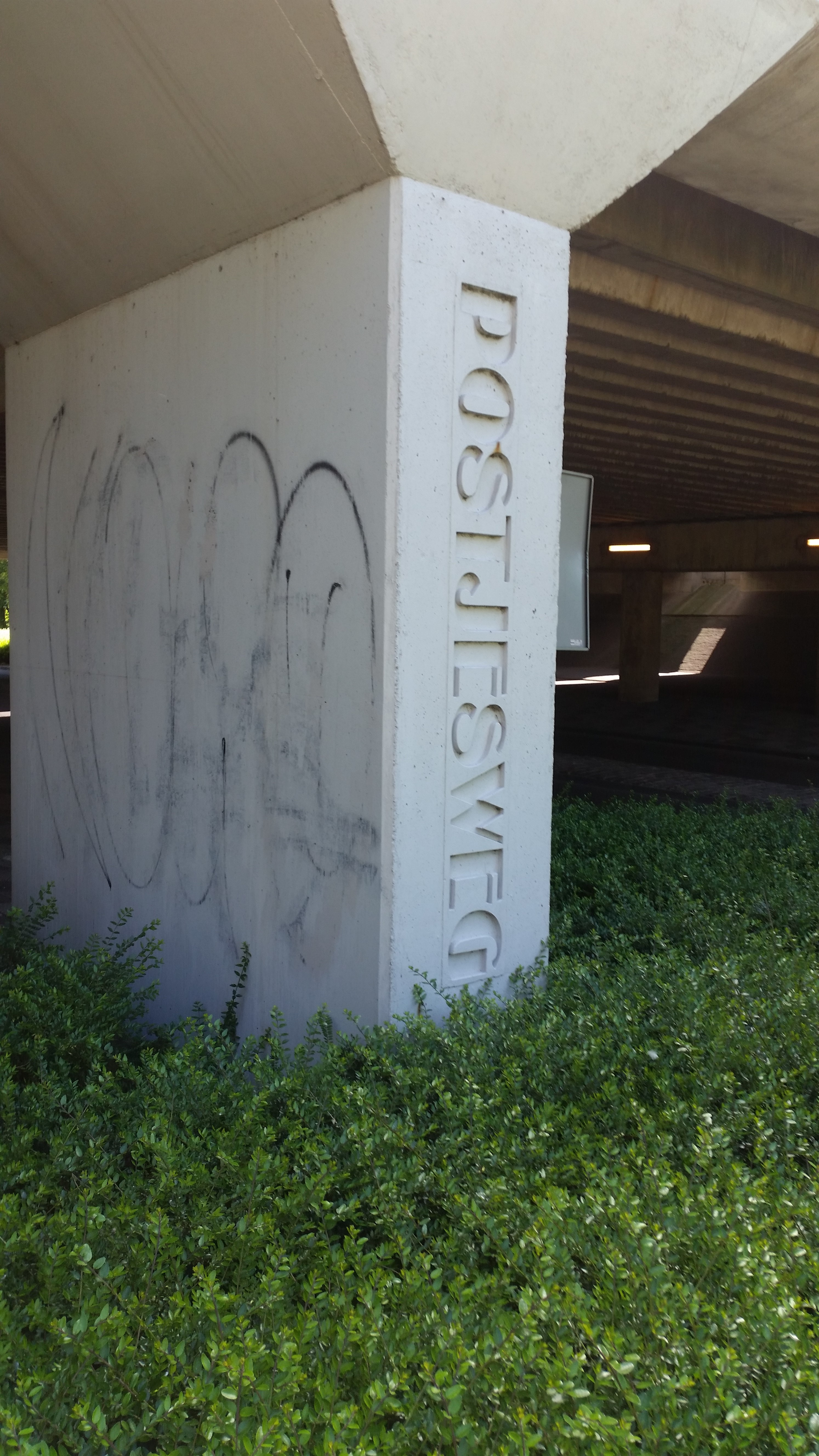 Postjeswegbrug in de Rijksweg 10 over de Postjesweg, Amsterdam; pijler met bewerking